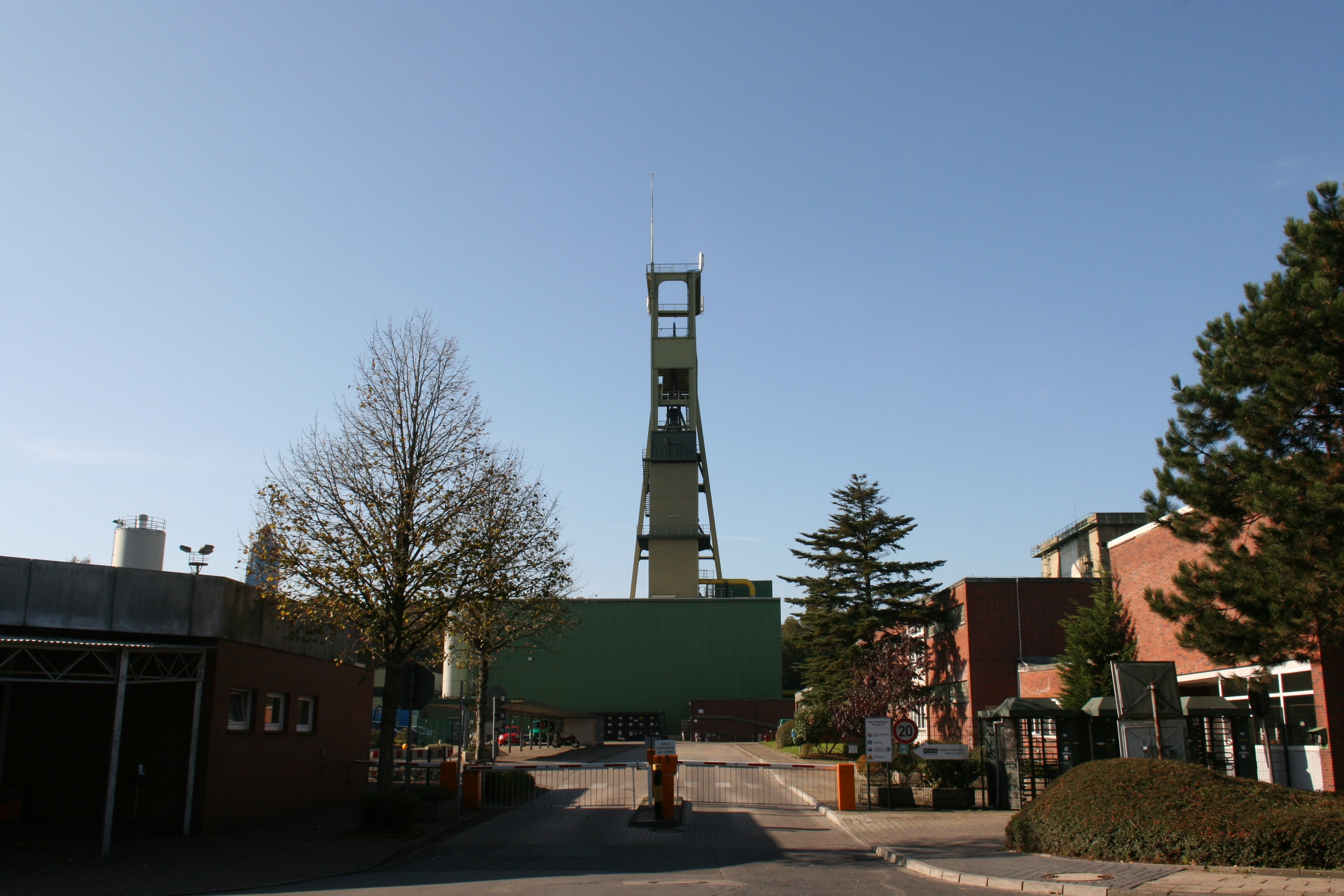 Zeche Prosper IV, Fernewaldstraße in Bottrop